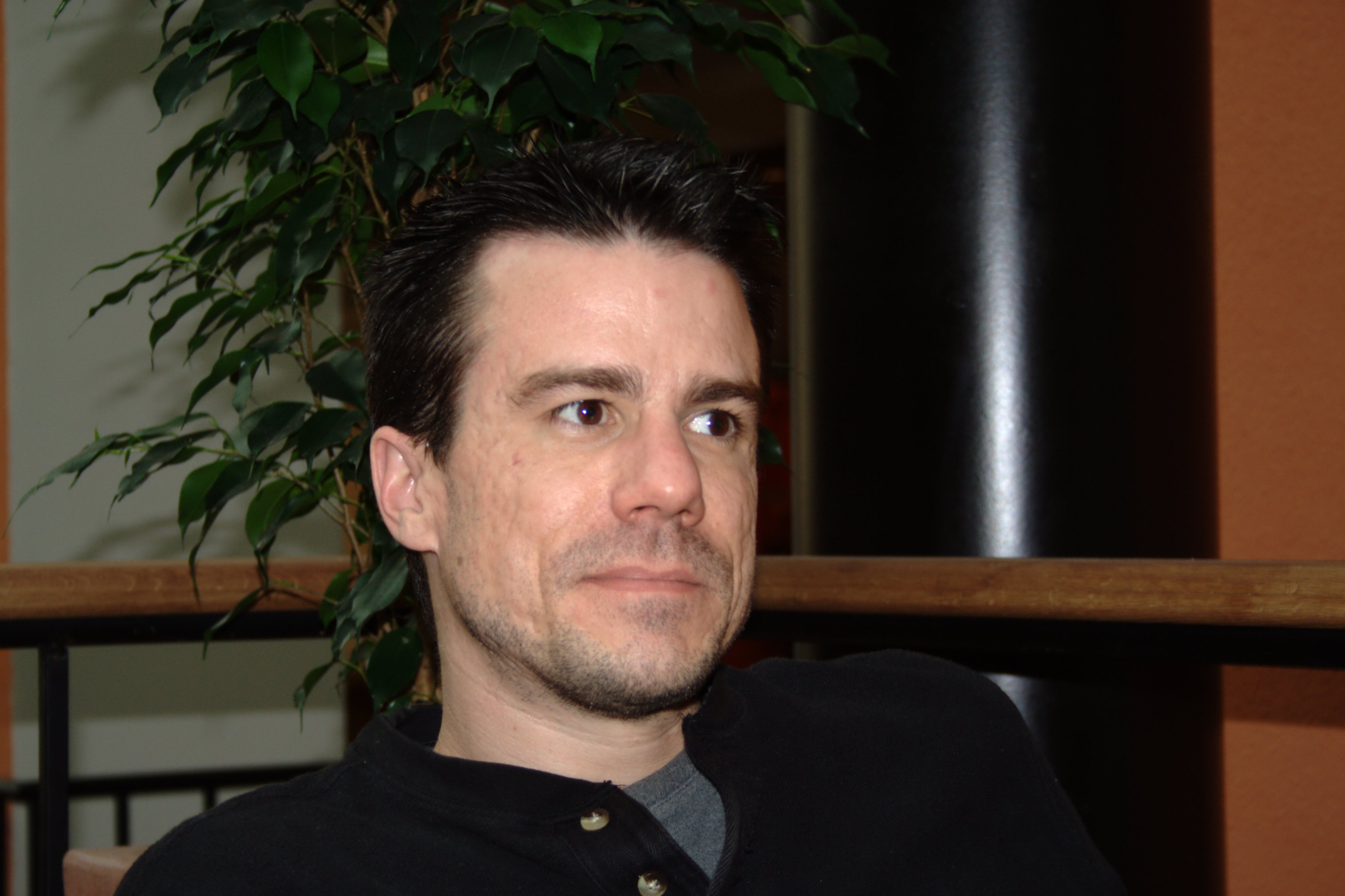 Ian Murdock (interview at the Holiday Club hotel). Please, attribute this photo as "Ilya Schurov, Computerra Weekly" if you wish to use it.